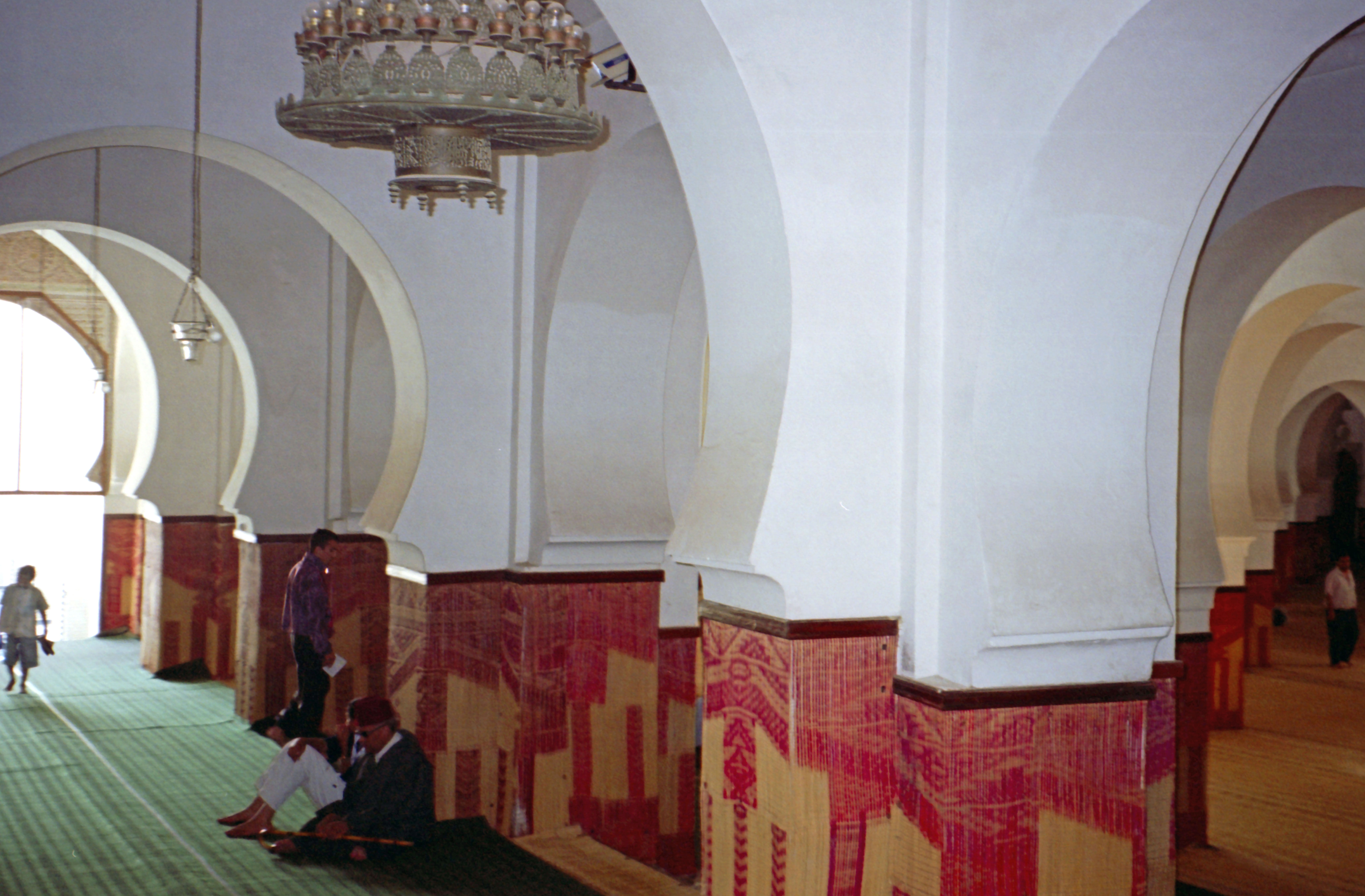 Morocco-121